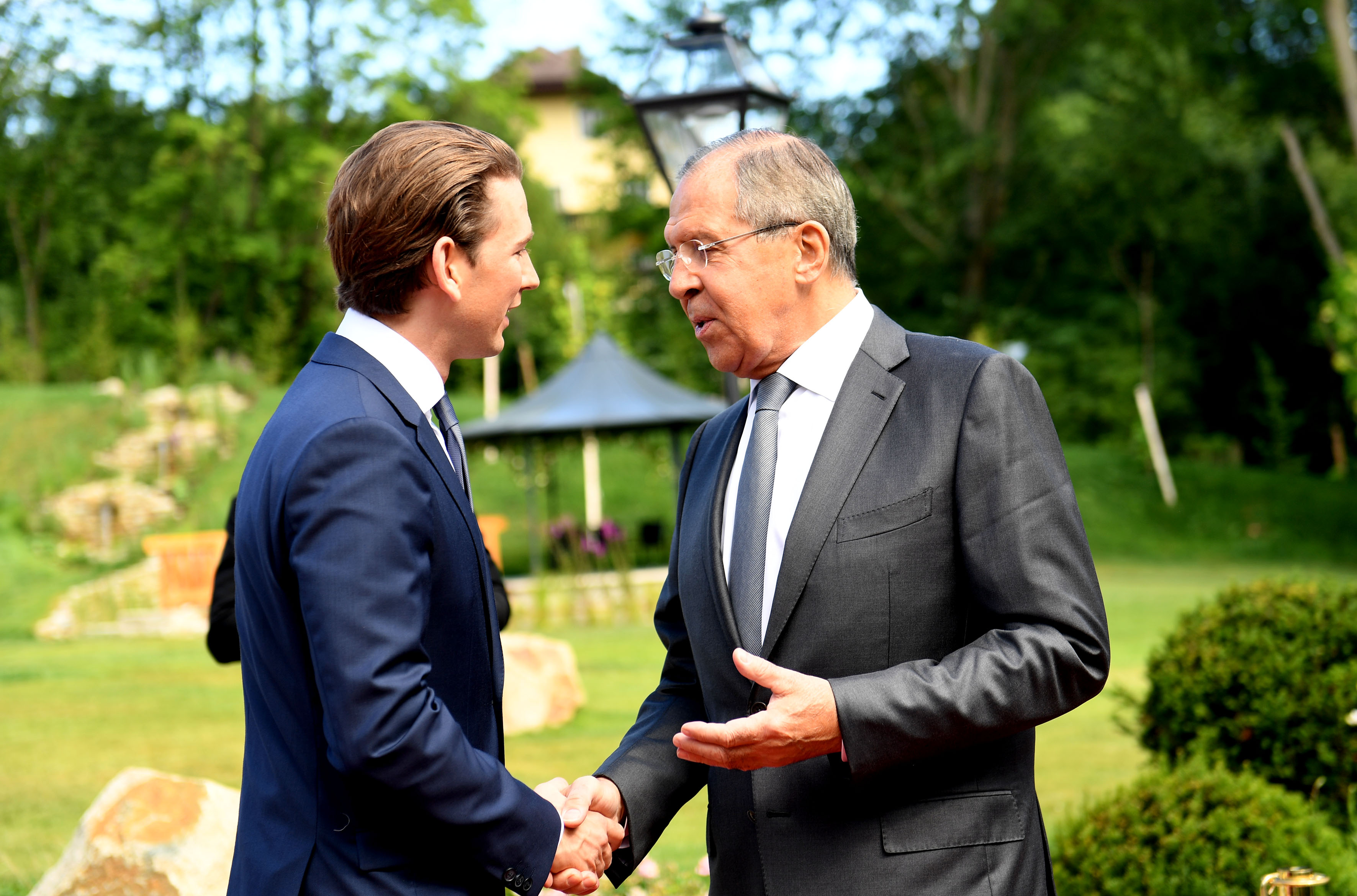 OSZE Mauerbach 11.Juli 2017 Foto: Mahmoud